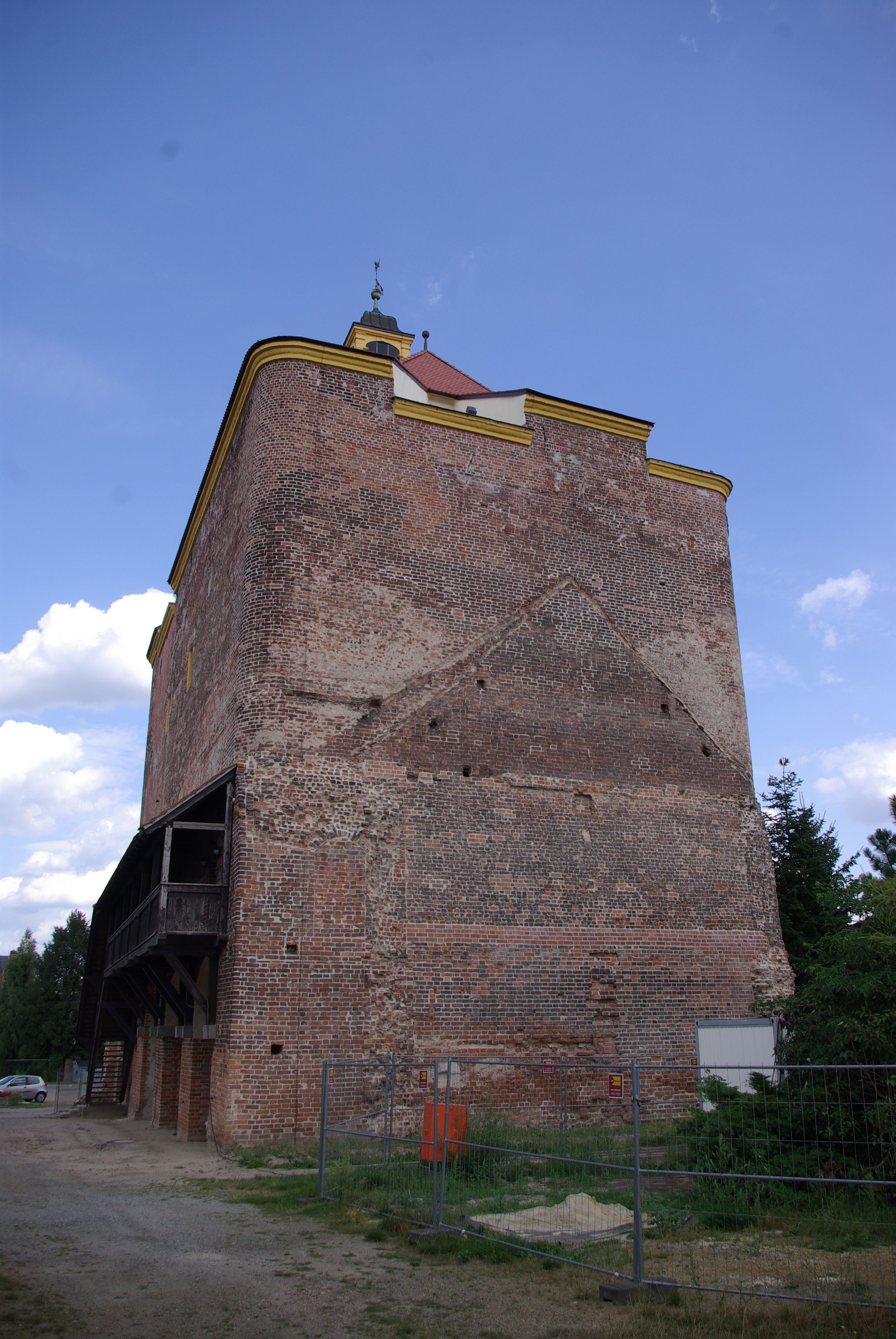 Peitz in Brandenburg. Der Turm der alten Festung aus dem Mittelalter steht unter Denkmalschutz.